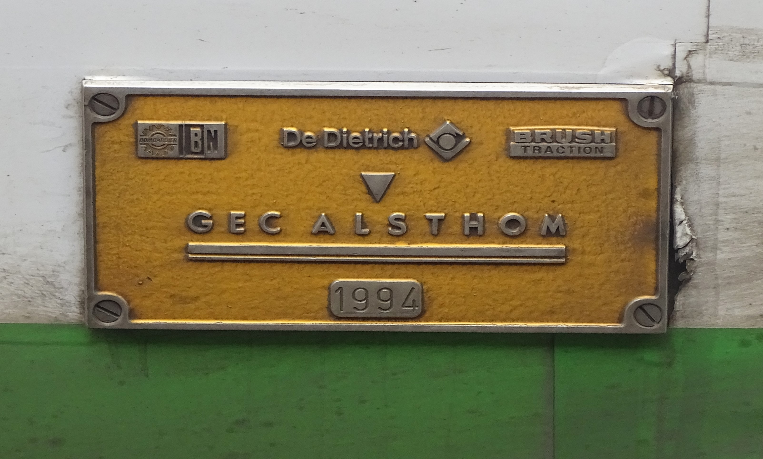 Plaque de constructeur de la motrice du TGV TMST (ex-Eurostar) 3213 exploité par Izy, en gare de Bruxelles-Midi.